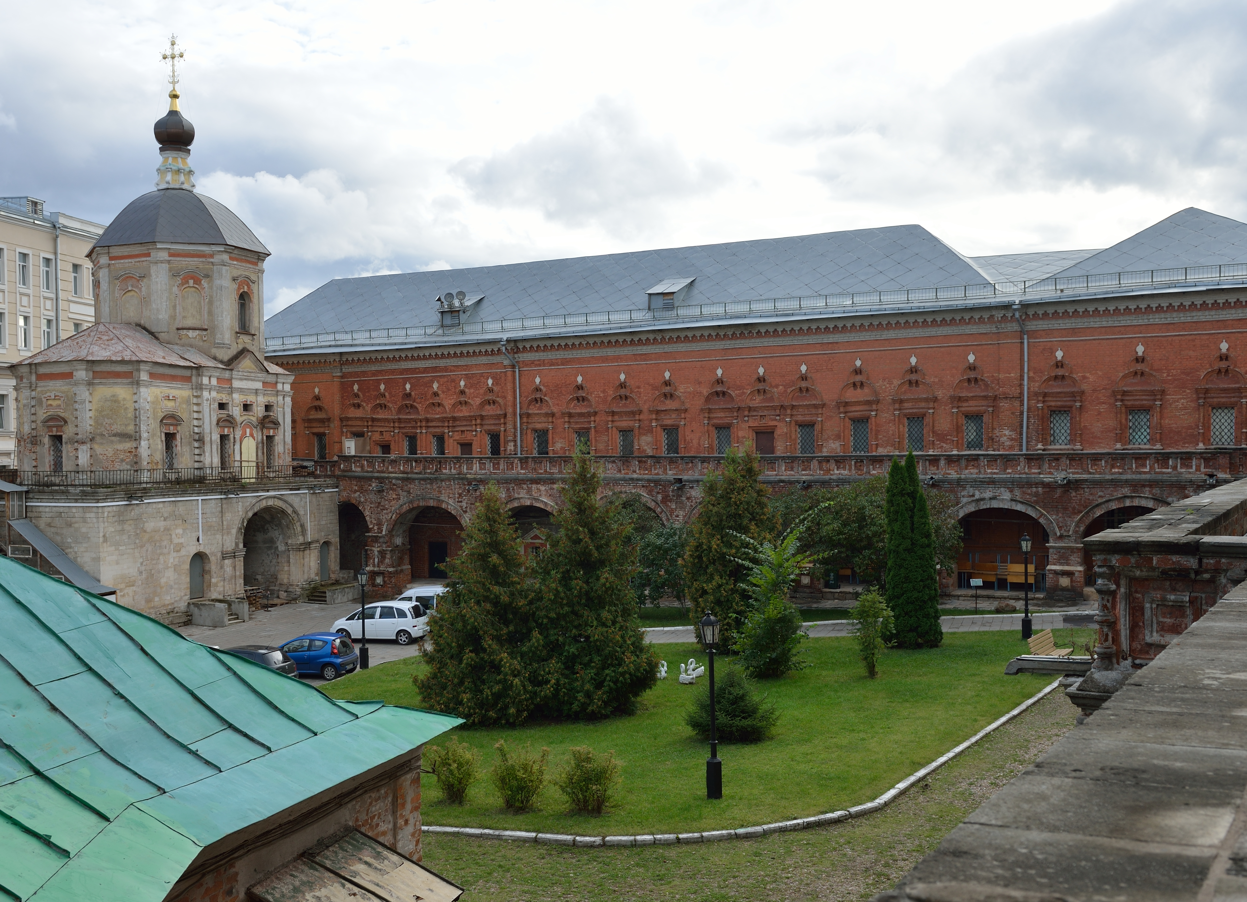 Церковь Пахомия: Петровка ул., дом 28, строение 7, Тверской, Центральный округ, Москва